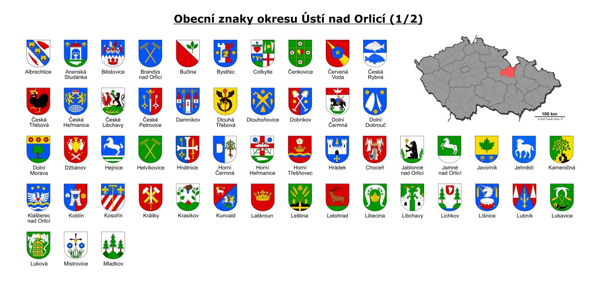 Přehled znaků okresu Ústí nad Orlicí